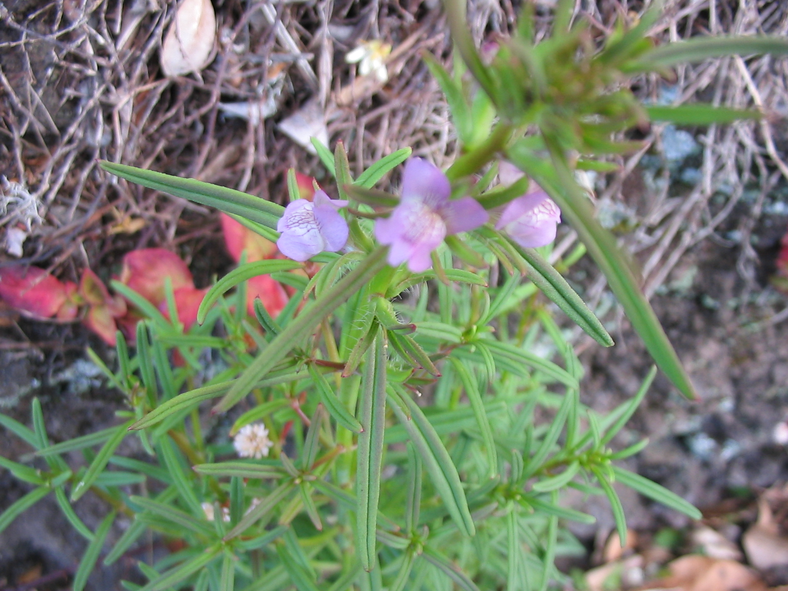 Acker-Löwenmaul (Misopates orontium) - Blüten